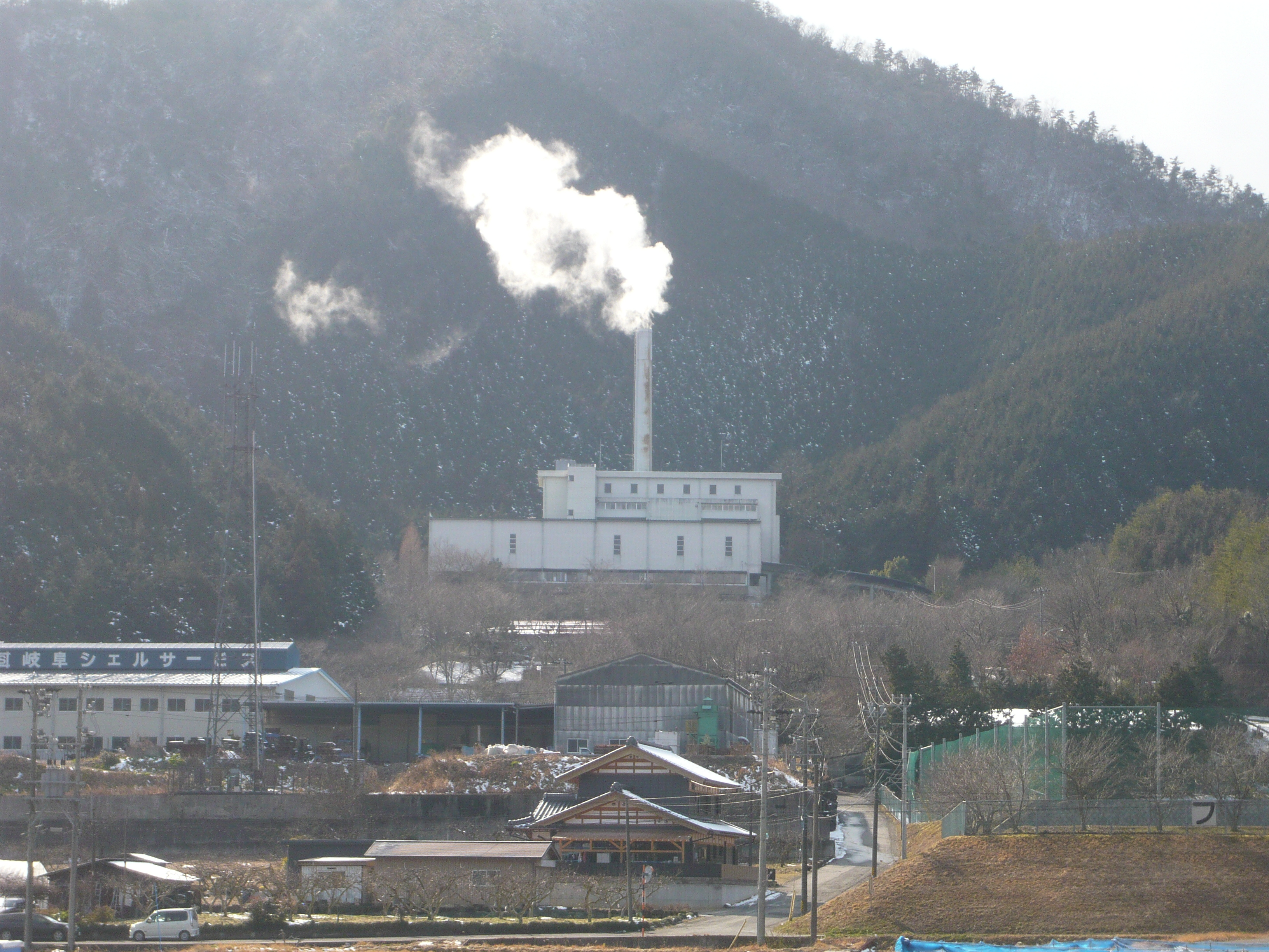 Kakebora Plant（掛洞プラント）,Gifu,Gifu,Japan（岐阜県岐阜市）で撮影。